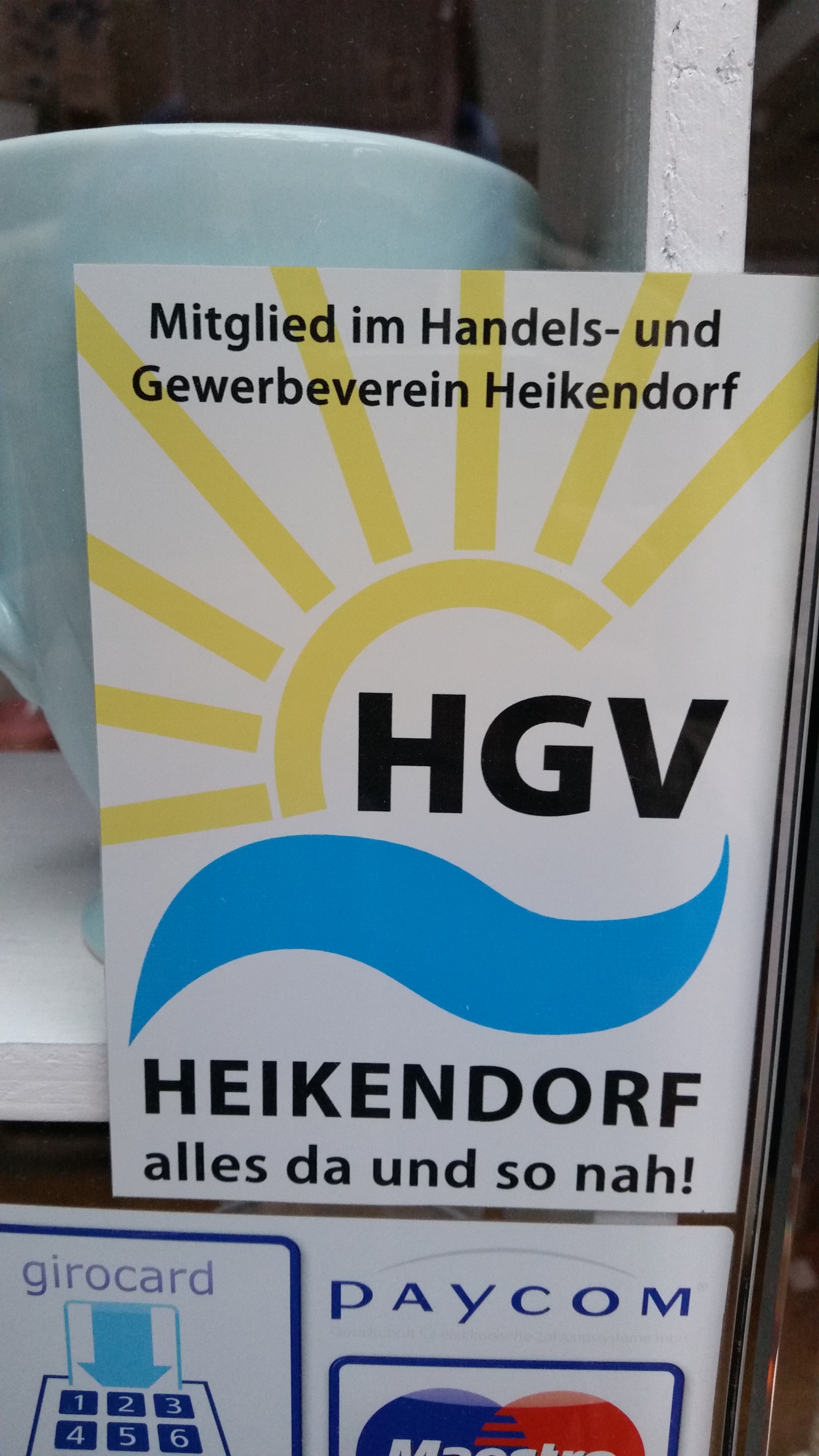 Mitgliedssticker an einer Tür - Handels- und Gewerbeverein Heikendorf e.V.